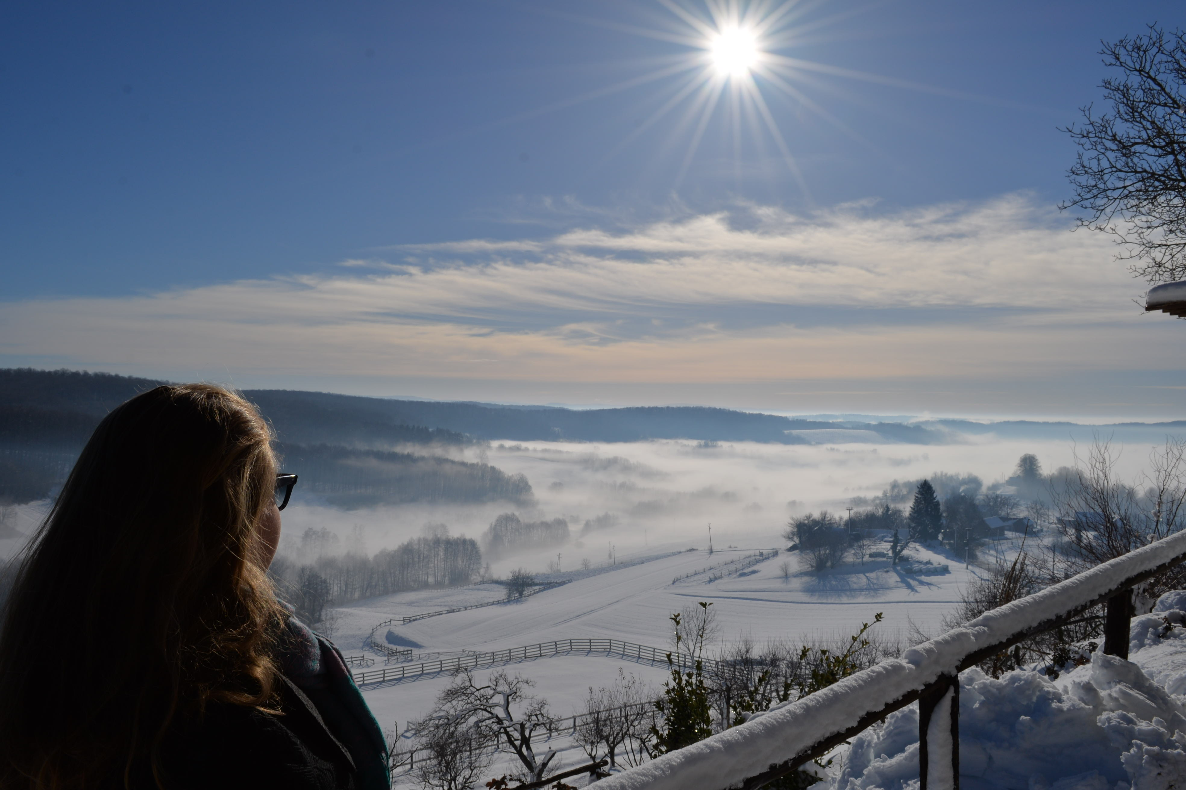 Ribnjačka, Bjelovarsko - bilogorska županija